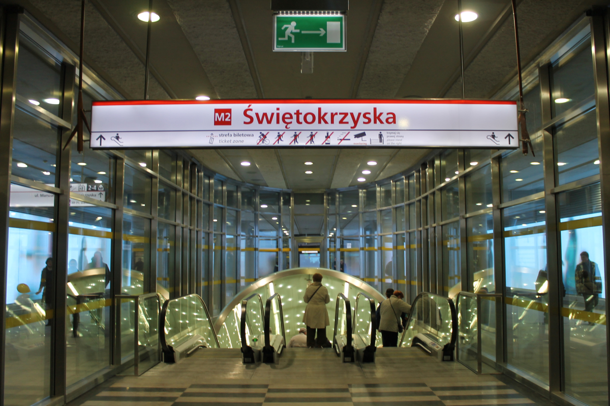 Zachodnia hala odpraw stacji C11 Świętokrzyska.